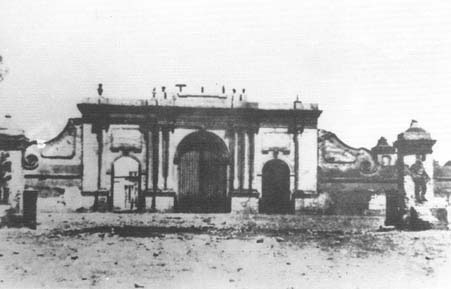 Aspecto de la Portada del Callao en 1870